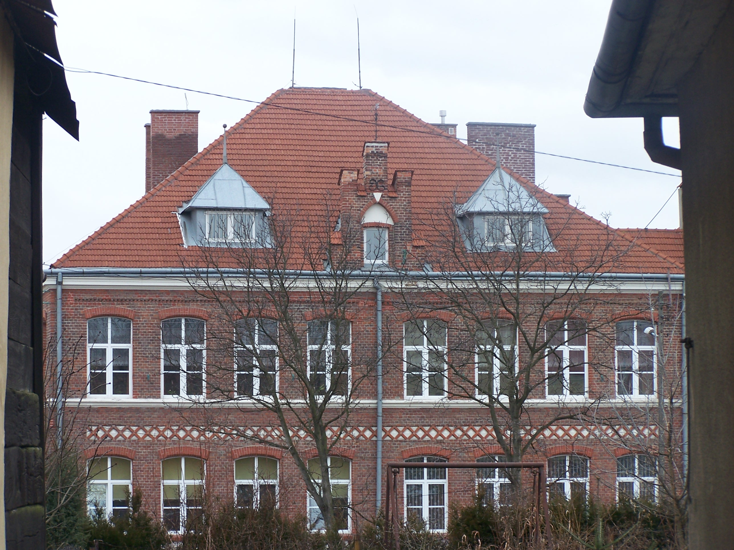 Dawna Szkoła Męska w Przeworsku